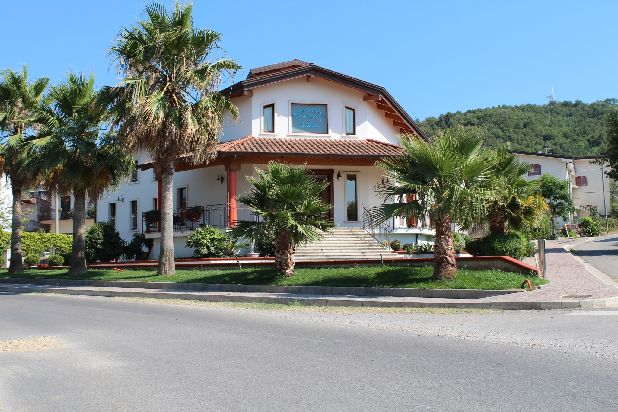 La Chiesa Evangelica Pentecostale "Assemblee di Dio in Italia" di Matinella, frazione di Albanella